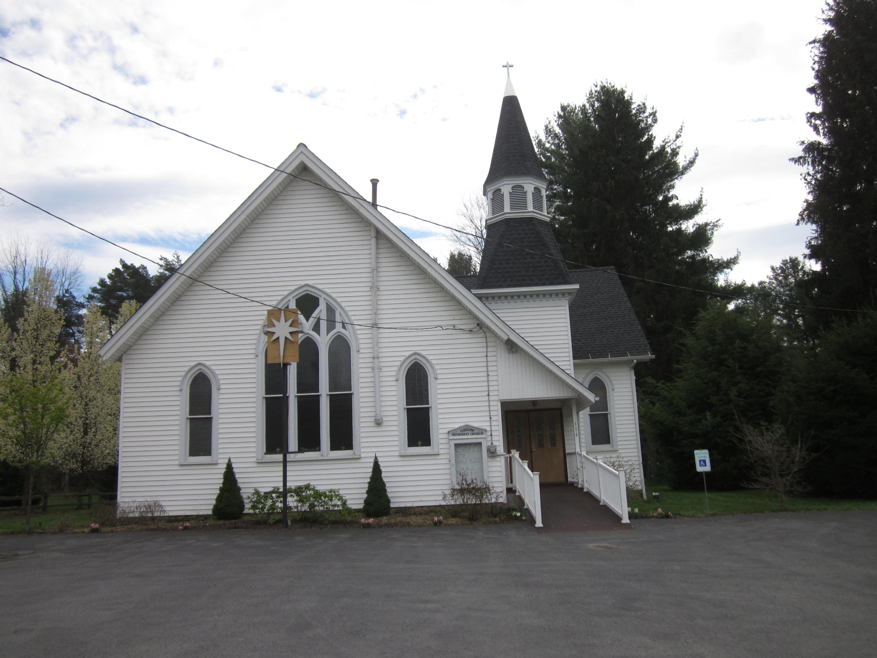 Clarington, Pennsylvania